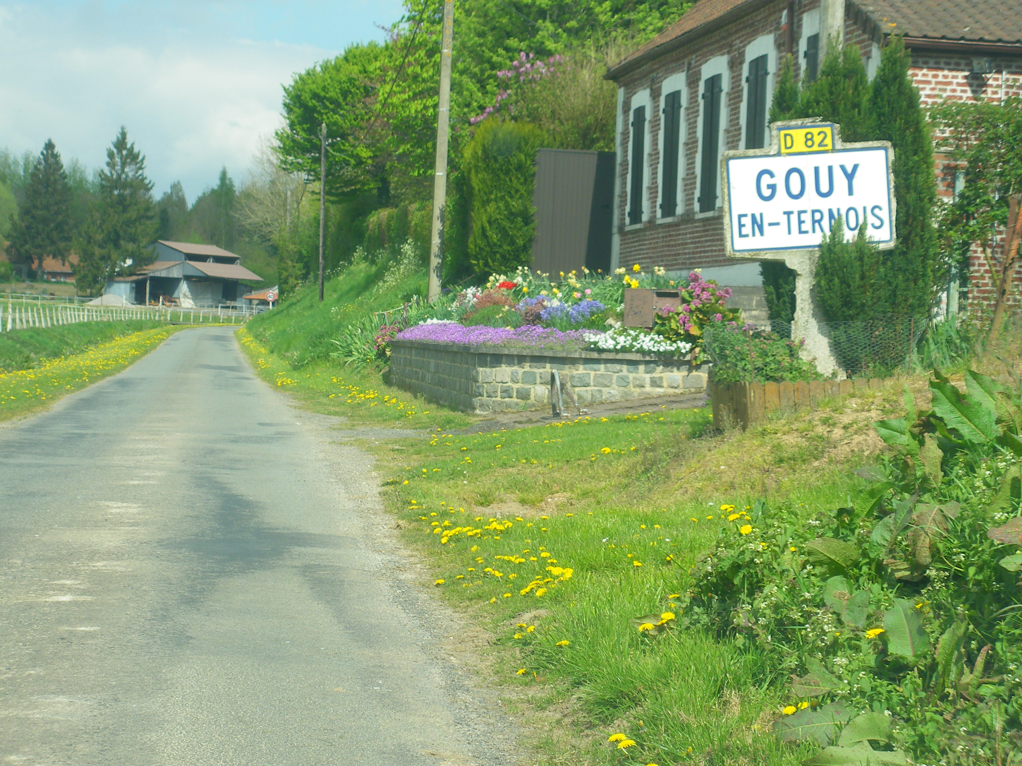 Vue d'une entrée de Gouy-en-Ternois.